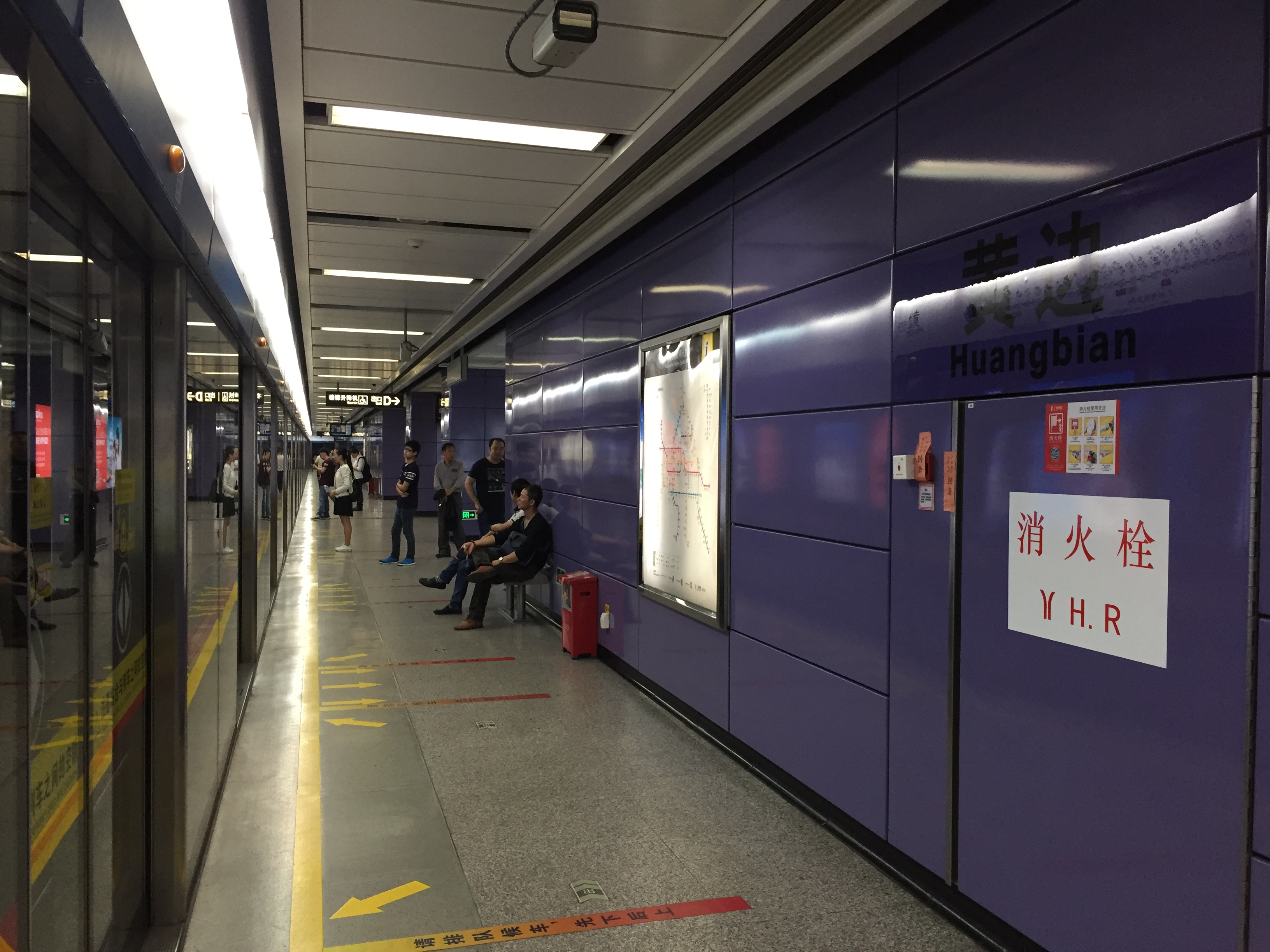 广州地铁黄边站